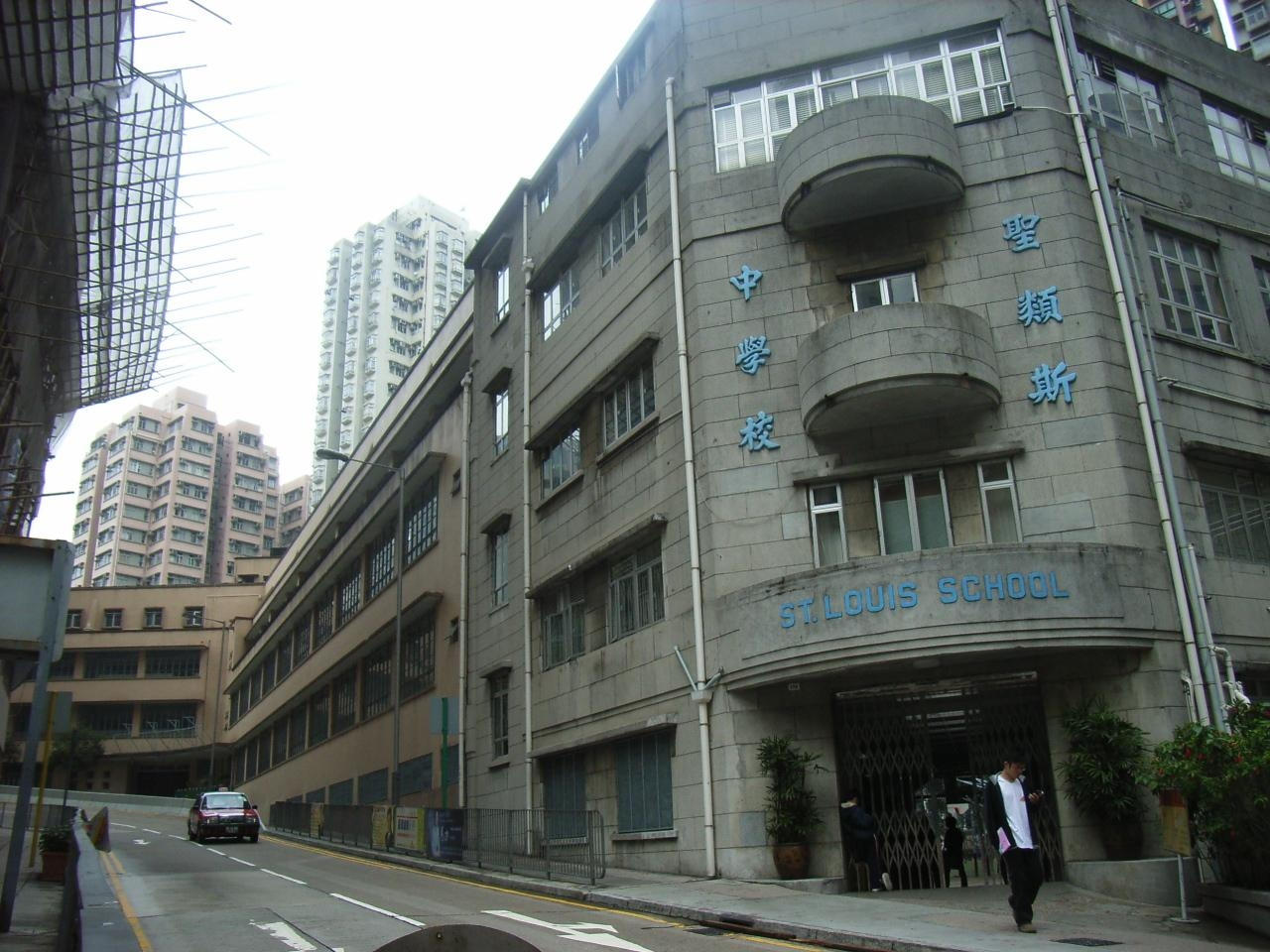 聖類斯中學是香港一間男子中學，校址位於zh:西環zh:第三街與zh:皇后大道西之間的一個山腰上。